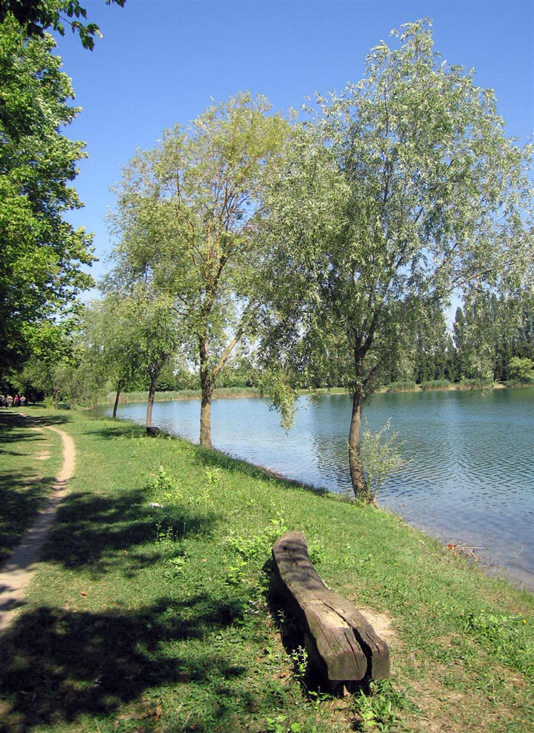 Riconosciuto nel 1990 come “bene ambientale di interesse sovracomunale” dalla Giunta Regionale Lombarda ed inserito nel SIPOM (Sistema Parchi Oltrepò Mantovano), il Parco San Lorenzo è una riserva naturalistica che si identifica come sede della natura e dell’identità padana. Il parco ha un’estensione complessiva di 54 ettari, di cui 7 occupati da un’area archeologica romana (II sec. a.C. – IV sec. d.C.), al centro della quale è insediata la matildica pieve di San Lorenzo. Tre laghetti, originati dalle escavazioni di argilla operate dalla fornace “Ca’ Rossa” fino alla fine degli anni ’80, conferiscono al parco la sua tipica fisionomia. Due di questi specchi d’acqua molto profondi, circondati da fasce di terreno e fiancheggiati dal canale di bonifica dell’Agro Mantovano-Reggiano, sono destinati alla pesca sportiva, mentre il terzo è adibito ad oasi naturale. La zona di maggiore rilevanza naturalistica è – appunto - l’Oasi Falconiera, in cui trovano dimora uccelli di varie speci, osservabili grazie ai punti attrezzati per il birdwatching. Oltre a pesci e volatili, la fauna del parco è ricchissima di insetti, anfibi e mammiferi. Proprio per questo il sito è di grande importanza per le sue potenzialità didattiche e culturali, per la ricca opportunità ricreativa e turistica, tutta da scoprire.